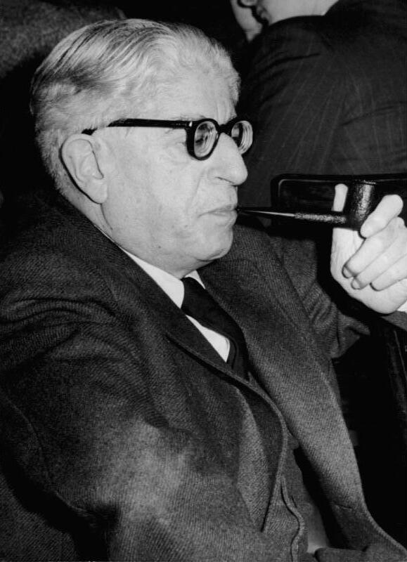 Berlin, Ernst Bloch auf 15. Schriftstellerkongress Zentralbild/Krueger 13.1.1956 XV. Deutscher Schriftsteller Kongress zu Berlin 4. Tag (13.1.1956) Am 4. Kongreßtag gingen die Diskussionen um aktuelle literarische Probleme weiter. Die Leitung des Kongresses hatte der der Berliner Schriftsteller Franz Fühmann. UBz: Prof. Ernst Bloch, Leipzig, Mitglied der Deutschen Akademie der Wissenschaften zu Berlin. Abgebildete Personen: Bloch, Ernst Prof. Dr.: Philosoph, Friedenspreis des Deutschen Buchhandels 1967, Bundesrepublik Deutschland (GND 118511742)